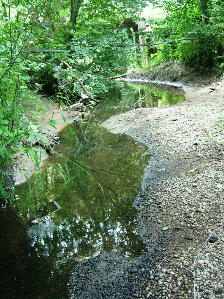 Bremena ties Debliais